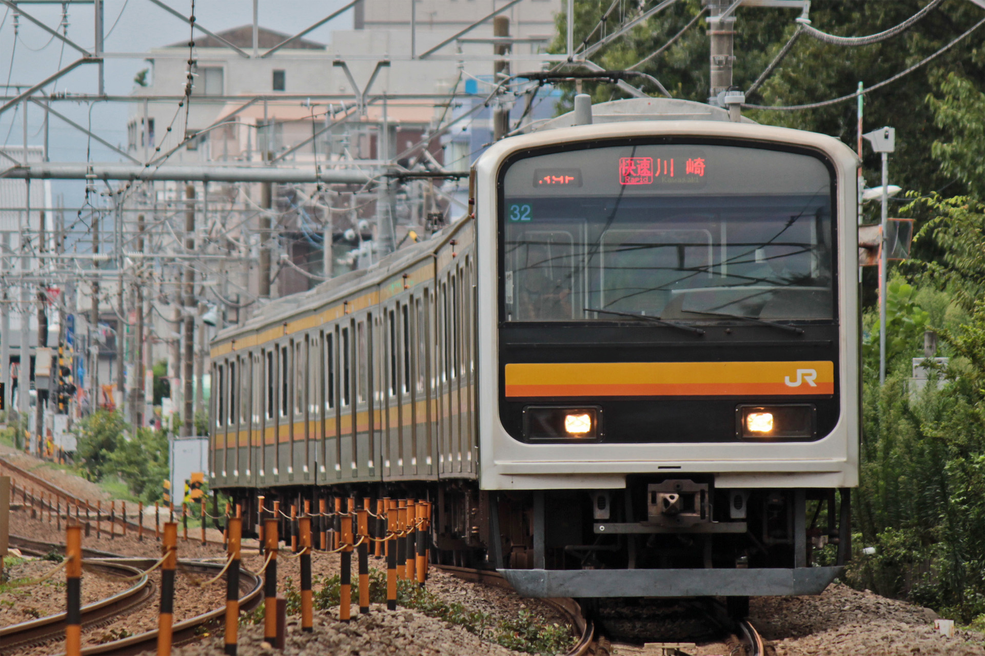 JR東日本209系電車(0番台・ナハ32編成)。矢川～谷保間にて。